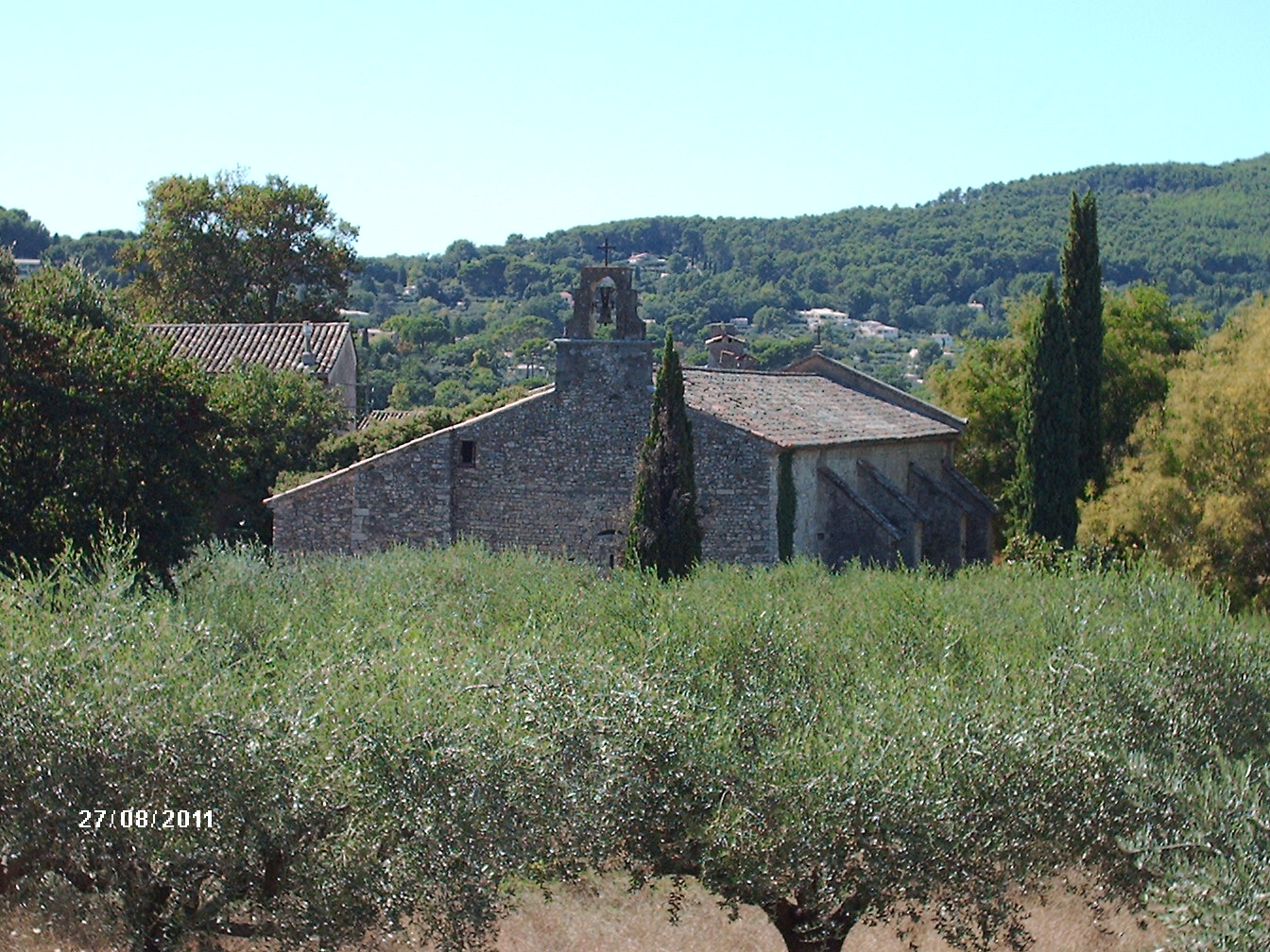 Chapelle du VI° siècle de Saint Hermentaire à Draguignan